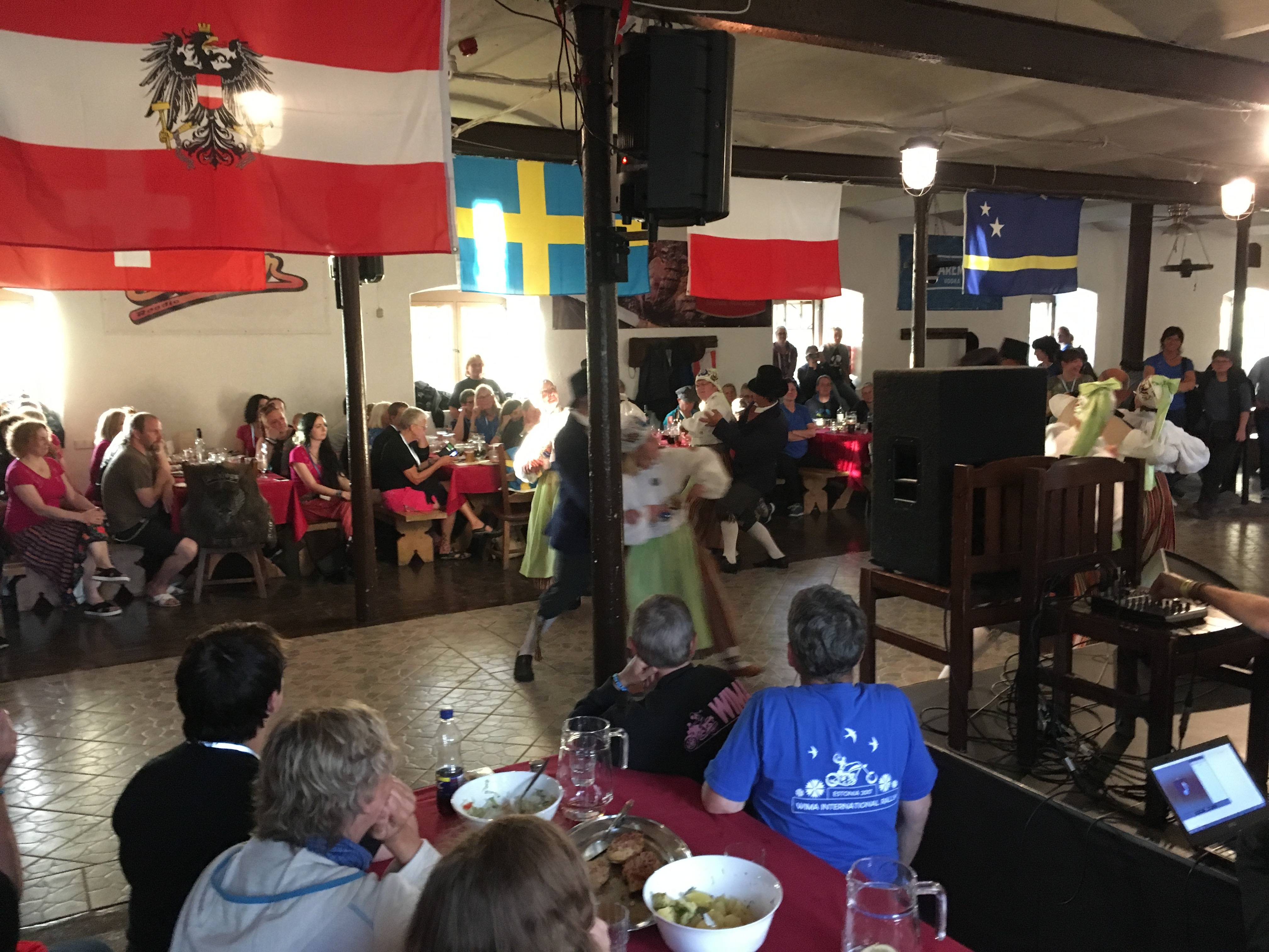 Eröffnungsfeier mit Landes Vorstellung